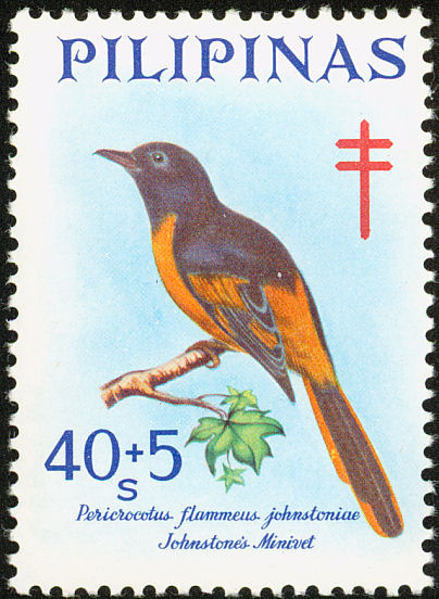 Pericrocotus speciosus